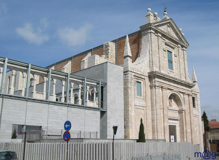 Valladolid – España (Spain) - Archivo Municipal - Antigua Iglesia de San Agustín: La iglesia primitiva se fundó en 1407. Se sustituyó por la actual a mediados del XVI. En 1619 se continuaron las obras con los planos del arquitecto Diego de Praves. Desde principios del siglo XX estuvo en ruinas. Fue rehabilitado, e inaugurado como Archivo Municipal en 2003.